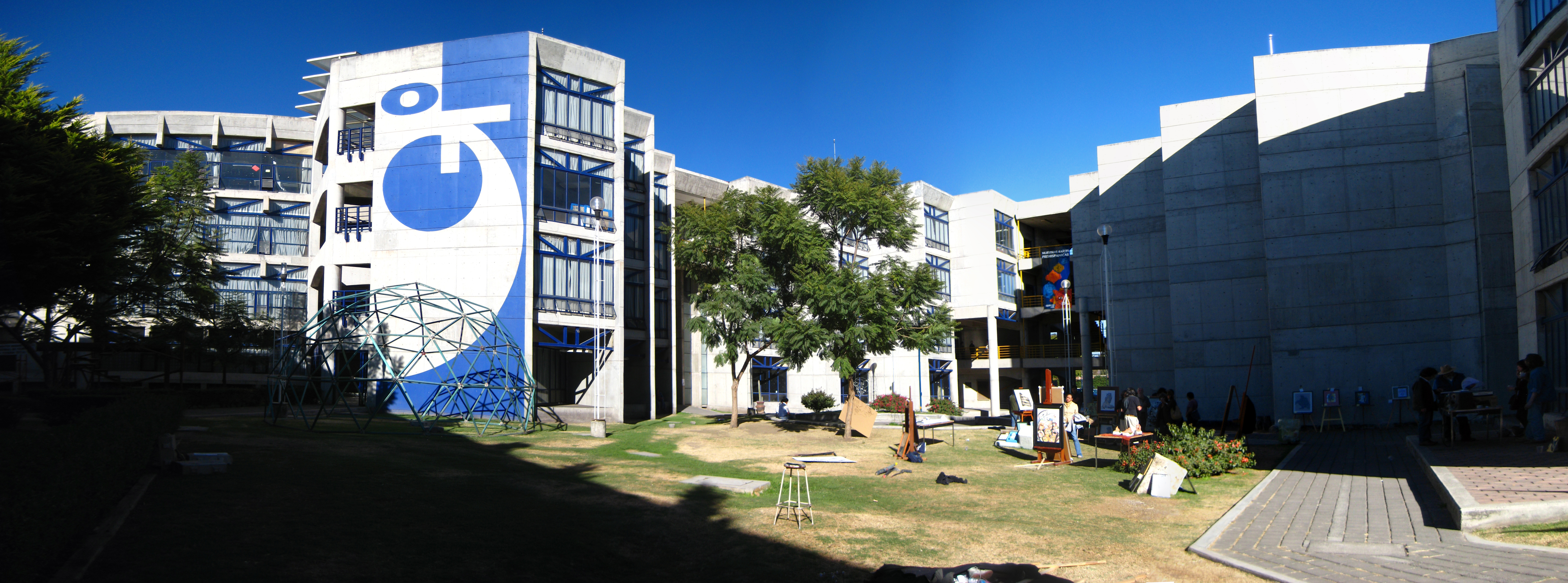 Fachada interior del claustro de la División de Ciencias y Artes para el Diseño de la Universidad Autónoma Metropolitana, Unidad Xochimilco, en la Ciudad de México.